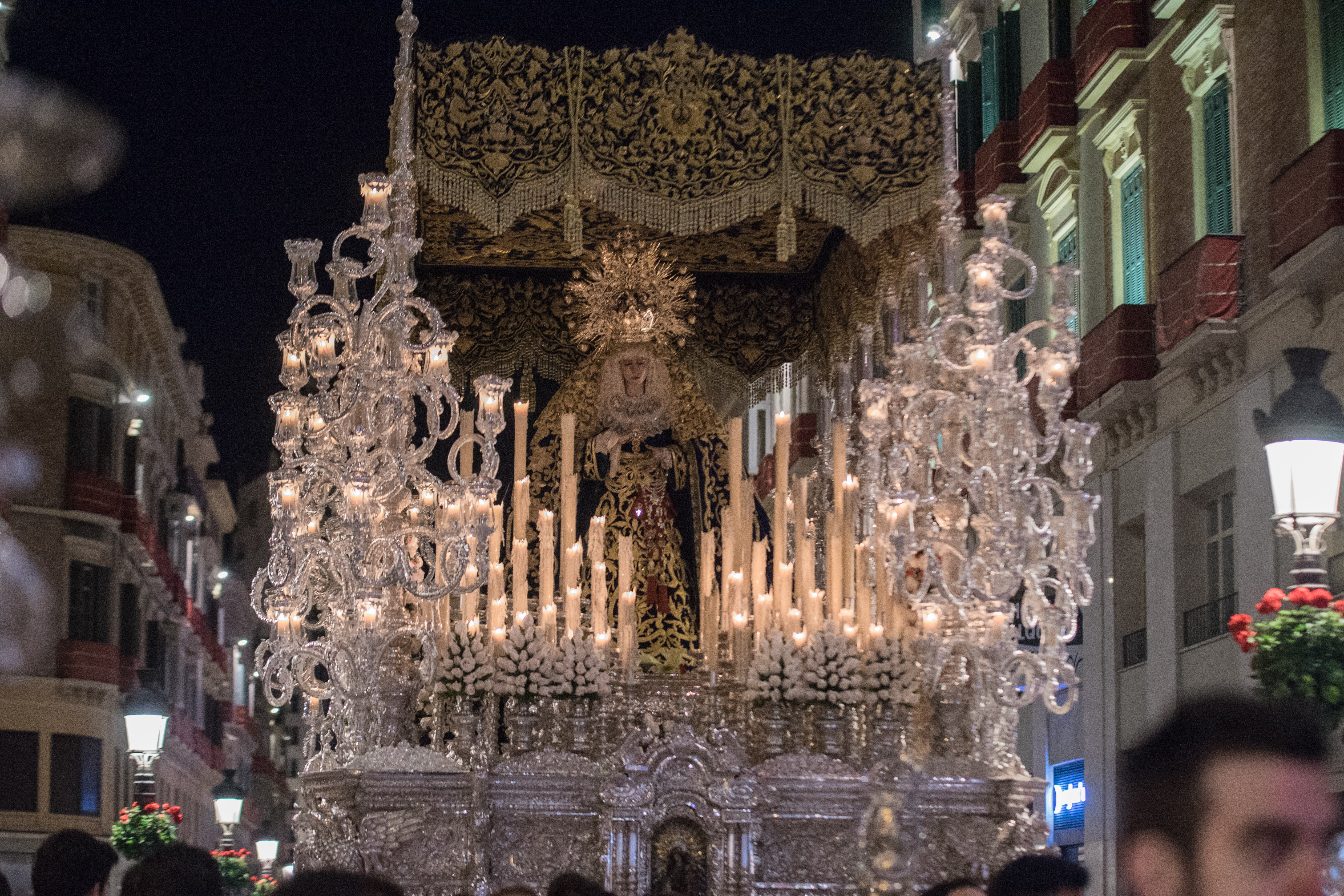 Trono del Perdón de la Fervorosa y Muy Ilustre Hermandad de Nuestro Padre Jesús del Prendimiento y María Santísima del Gran Perdón This is a photography of a Folklore festival in Spain (Wikidata id Q9075883).